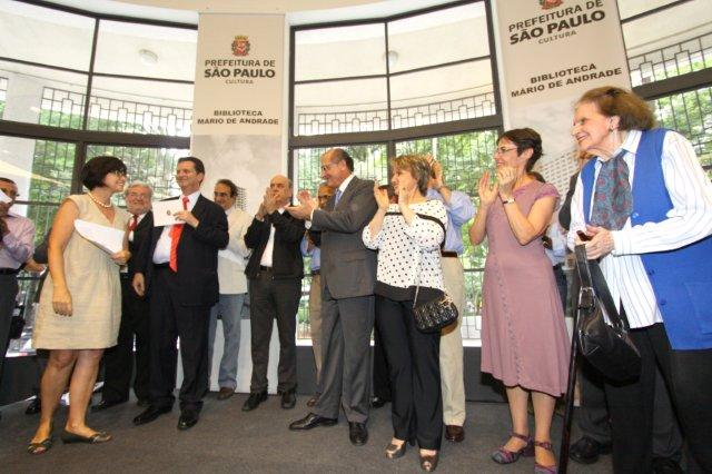 A ministra da Cultura, Ana de Hollanda, prestigiou a cerimônia de reabertura da Biblioteca Municipal de São Paulo – Mário de Andrade, evento que fez parte das comemorações do aniversário de 457 anos do município. Foto: Marcos Fioravanti